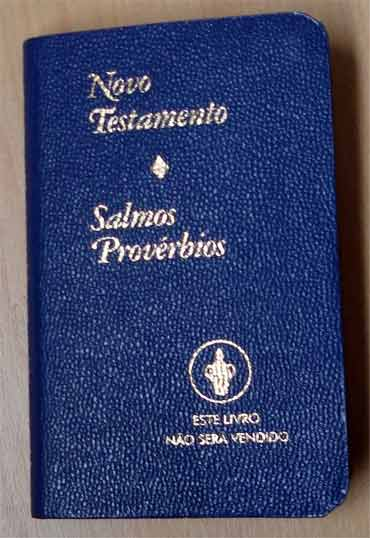 Novo Testamento azul, bolso, Gideões Internacionais no Brasil